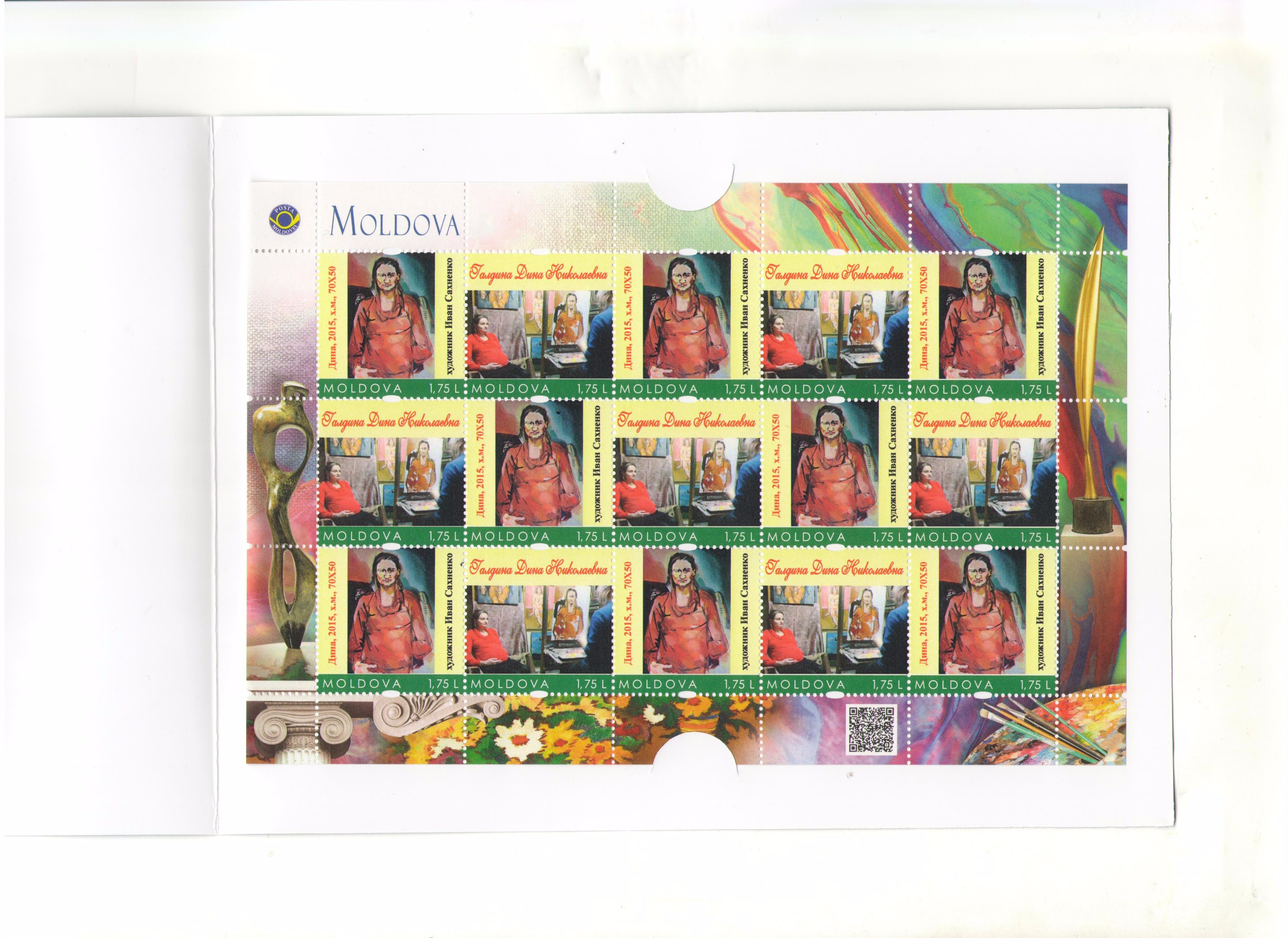 Малый лист персонализированных почтовых марок Республики Молдова: - картина художника Ивана Сахненко: Дина, 2015, х.м., 70Х50; - процесс написания художником Иваном Сахненко картины Дина, 2015, х.м., 70Х50 (Галдина Дина Николаевна позирует в рабочей студии художника Ивана Сахненко в процессе написания «Дины»).